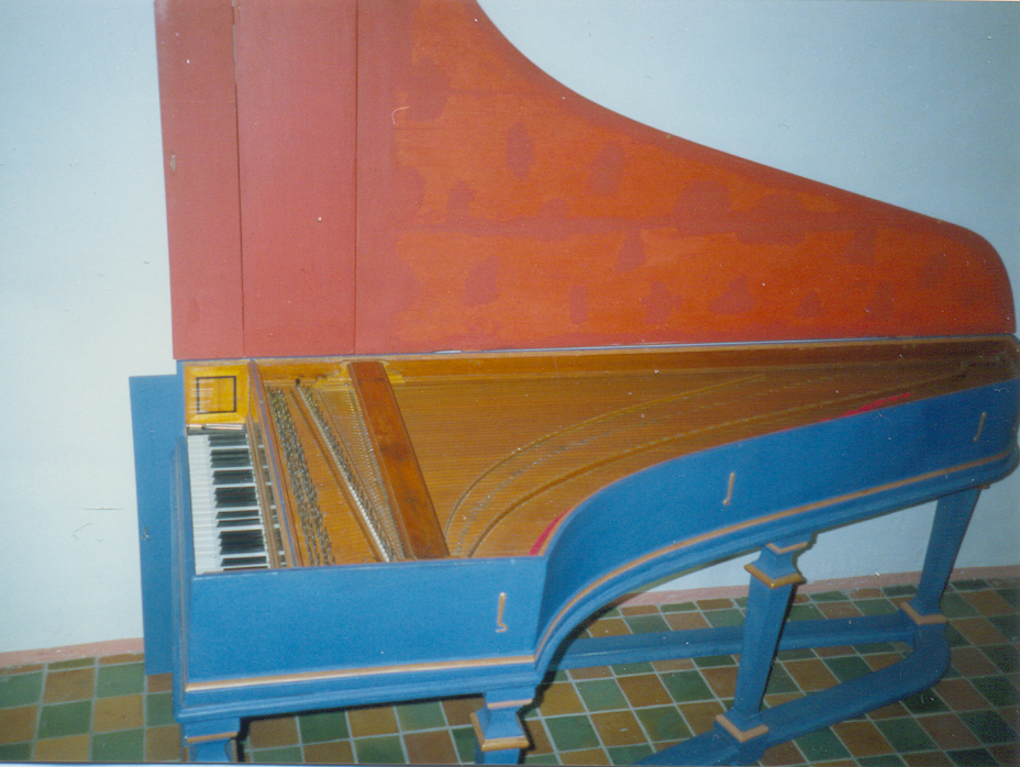 Cembalo von Christian Zell (1741) im Organeum Weener